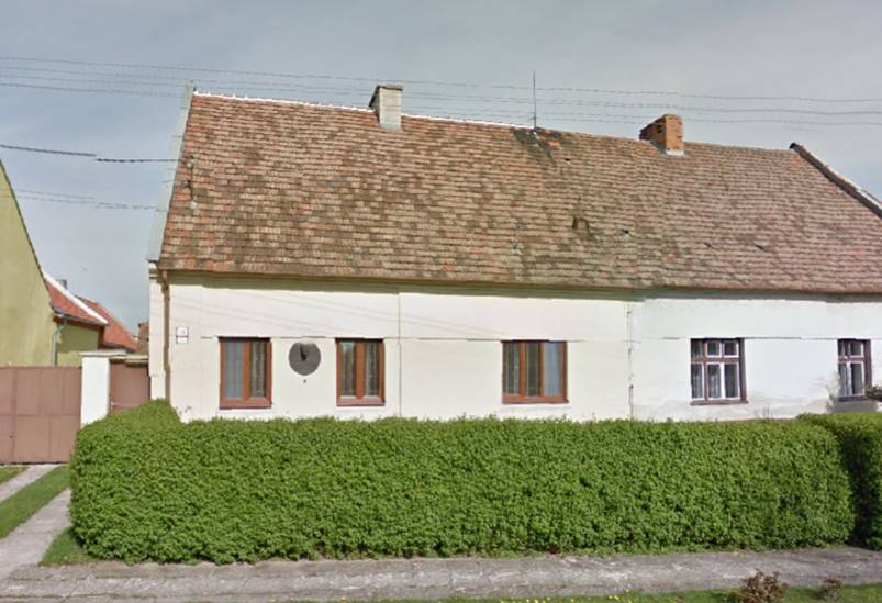 Dom pamätný